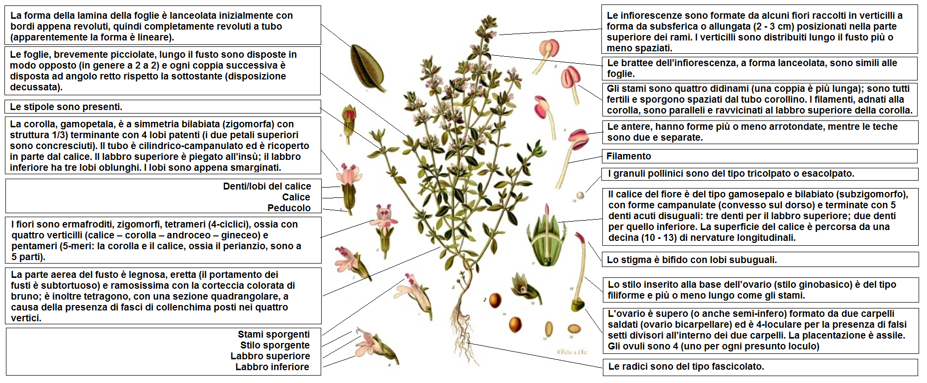 Thymus vulgaris - Descrizione della pianta